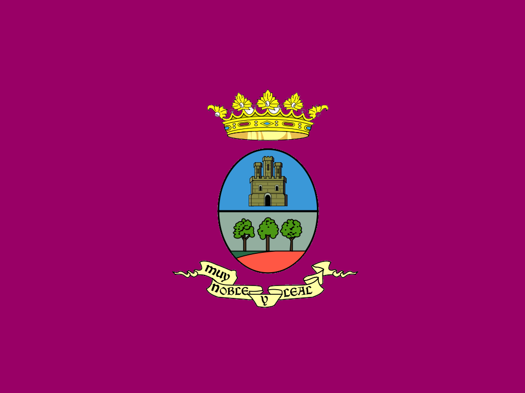 Bandera de Villarrobledo, en Albacete (España).